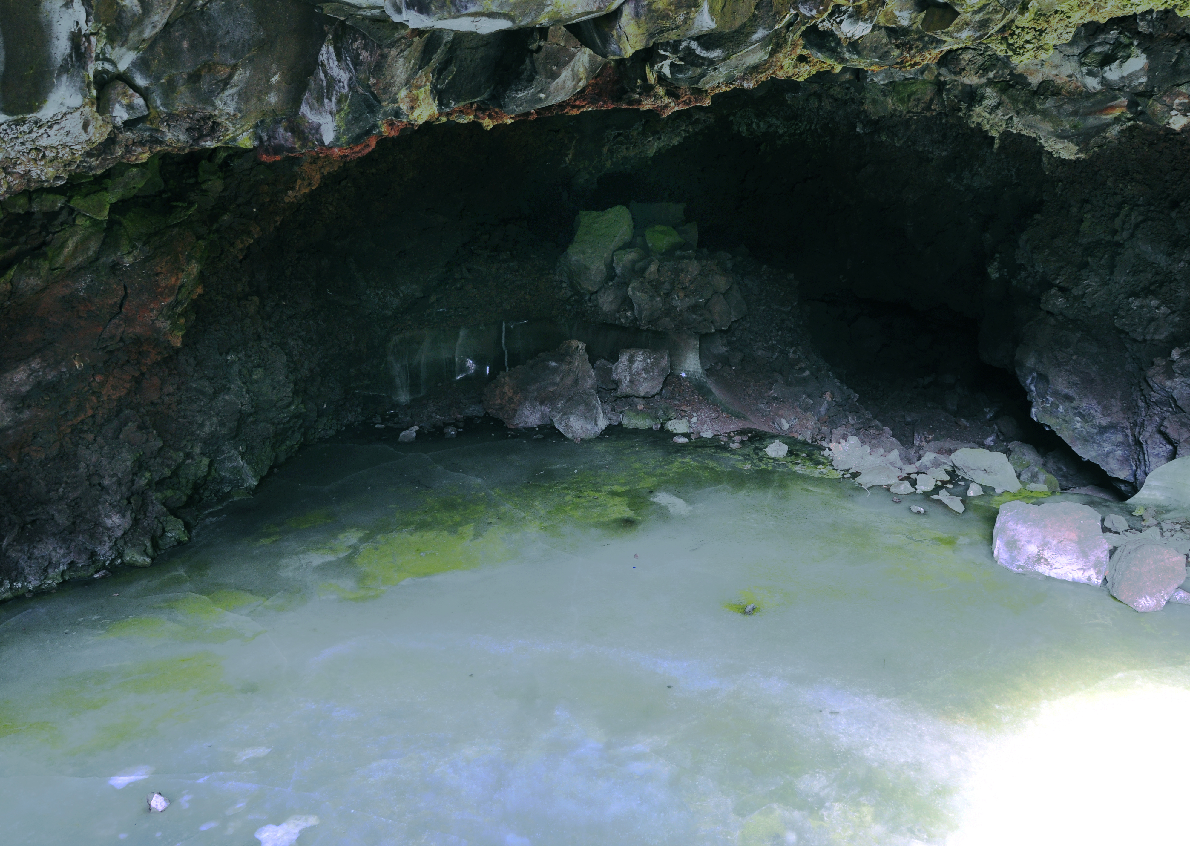 Zuni Bandera Ice Cave